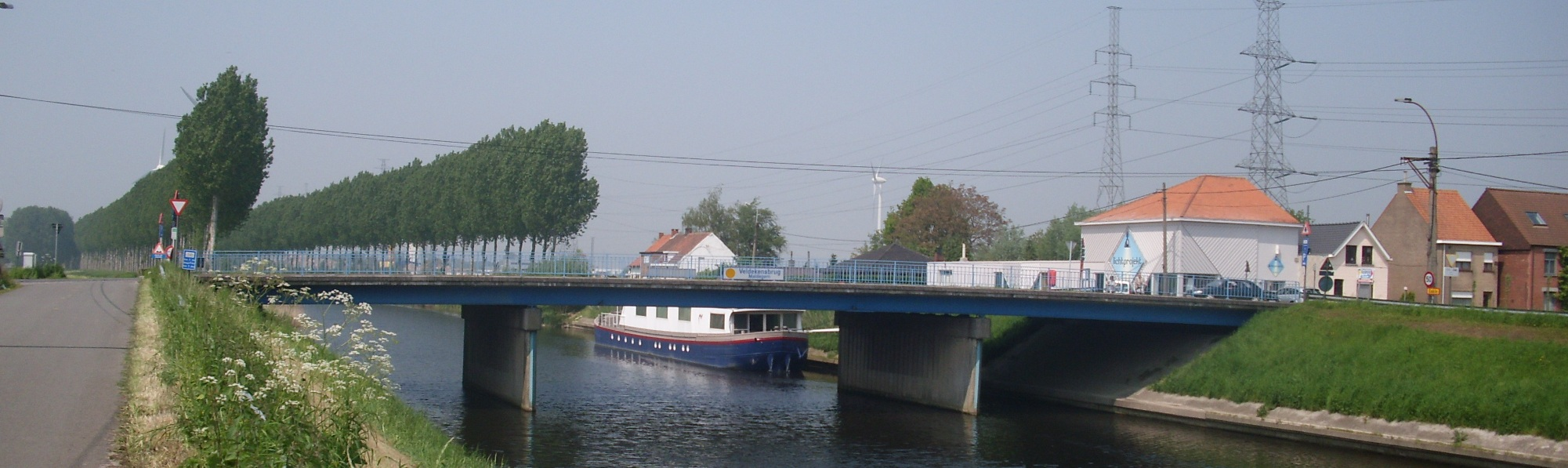 Veldekensburg over het Schipdonkkanaal (N499) - Adegem - Maldegem - Oost-Vlaanderen - België